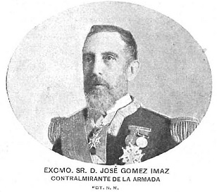 Retrato de José Gómez Imaz, recogido en la revista española Nuevo Mundo.